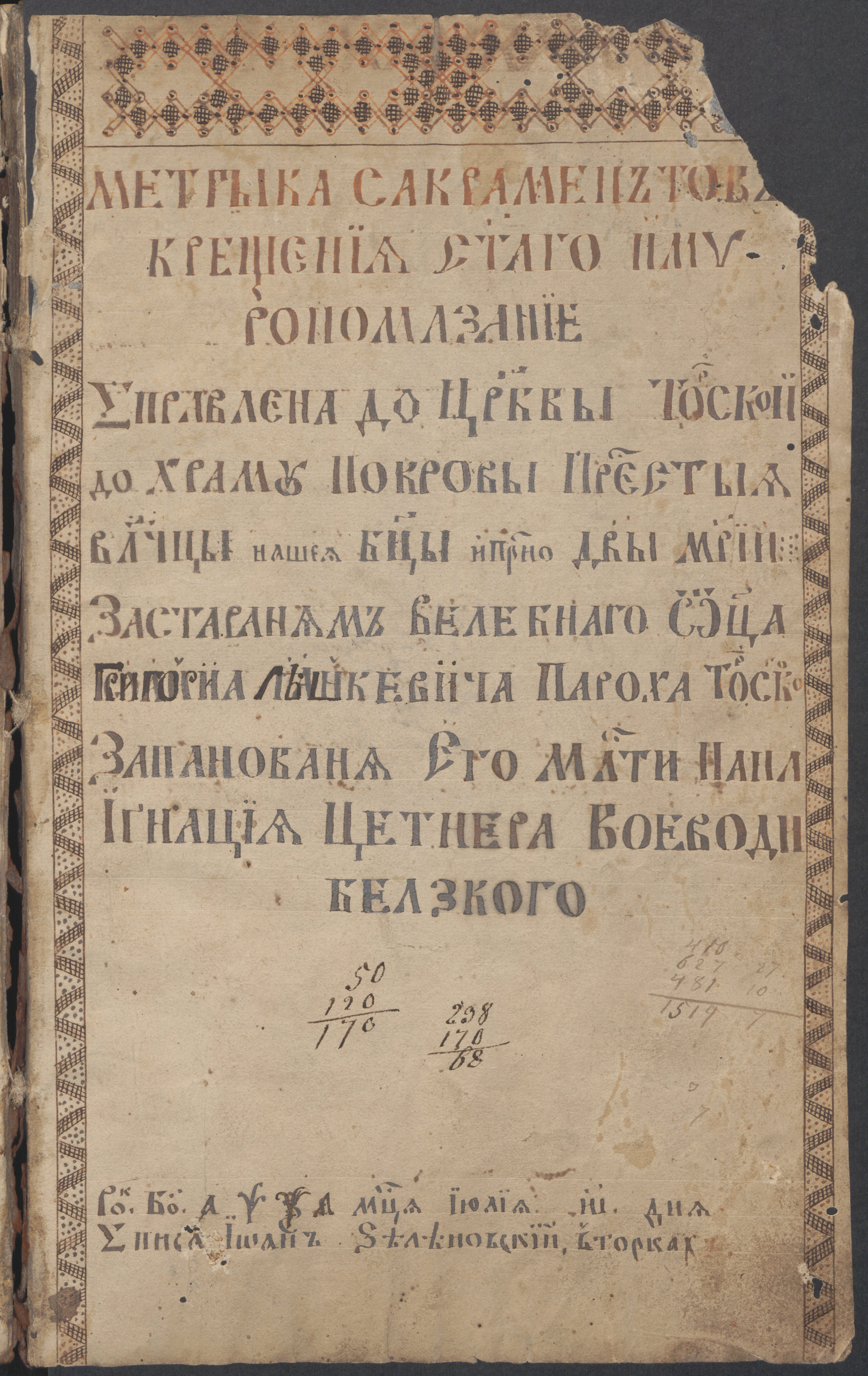 Частина метричної книги парафії села Торки на Надсянні. 1771 - 1806 роки.